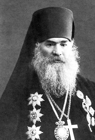 Епископ Никанор (Каменский)